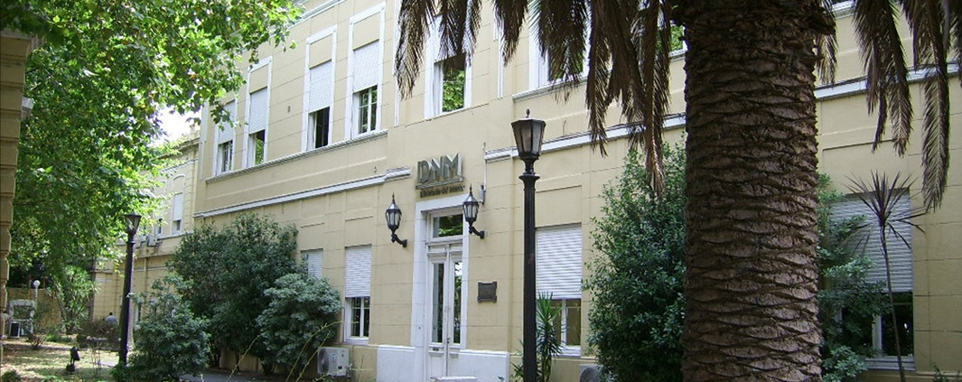 Direccion Nacional de Migraciones Argentina